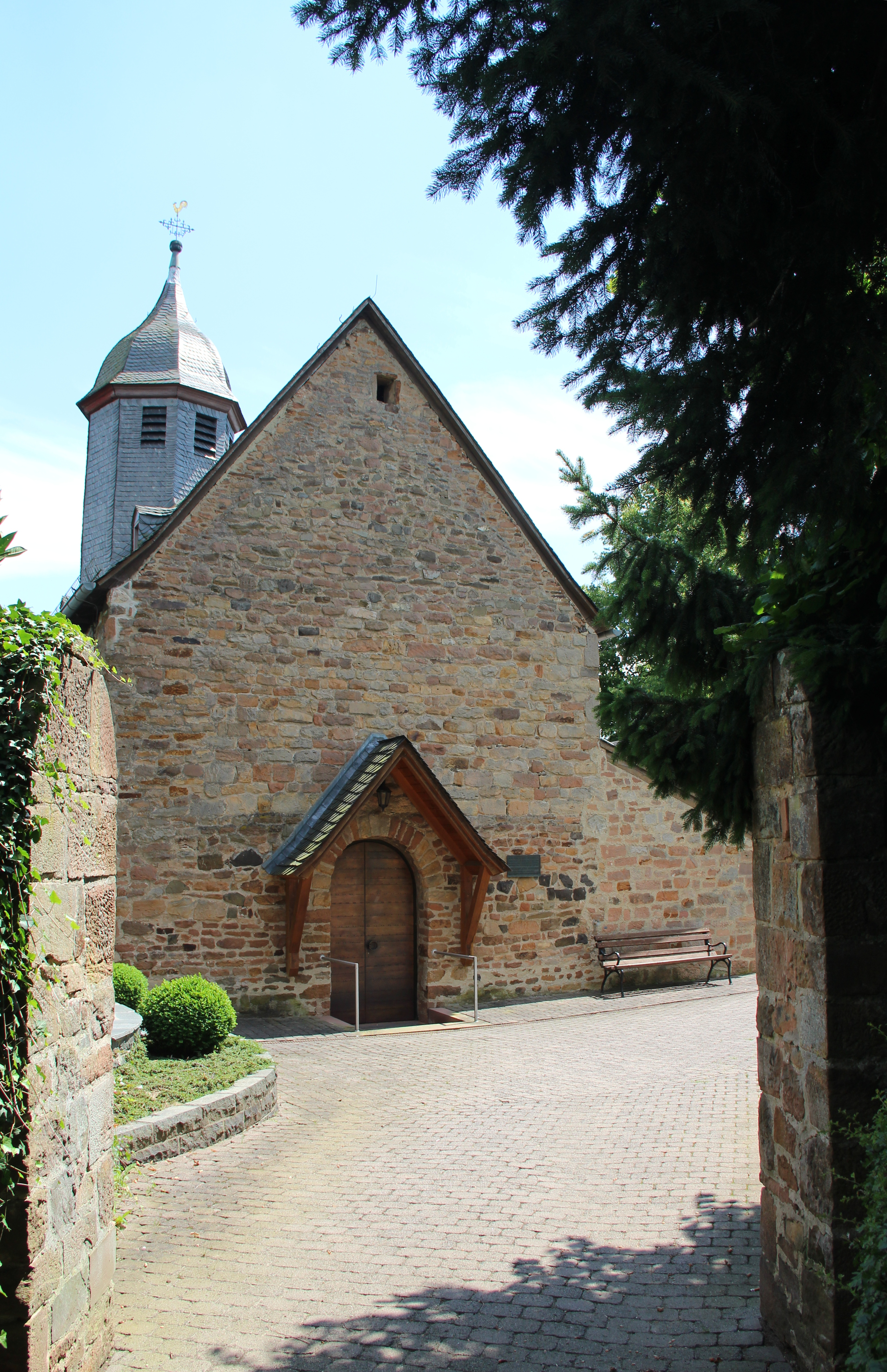 Kirche - Ansicht vom Eingang zum Friedhof